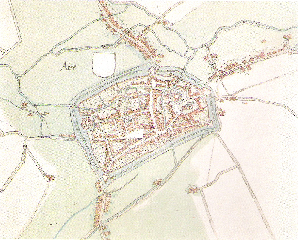 Plan dit de Deventer de la ville d'Aire au milieu du XVIe siècle.